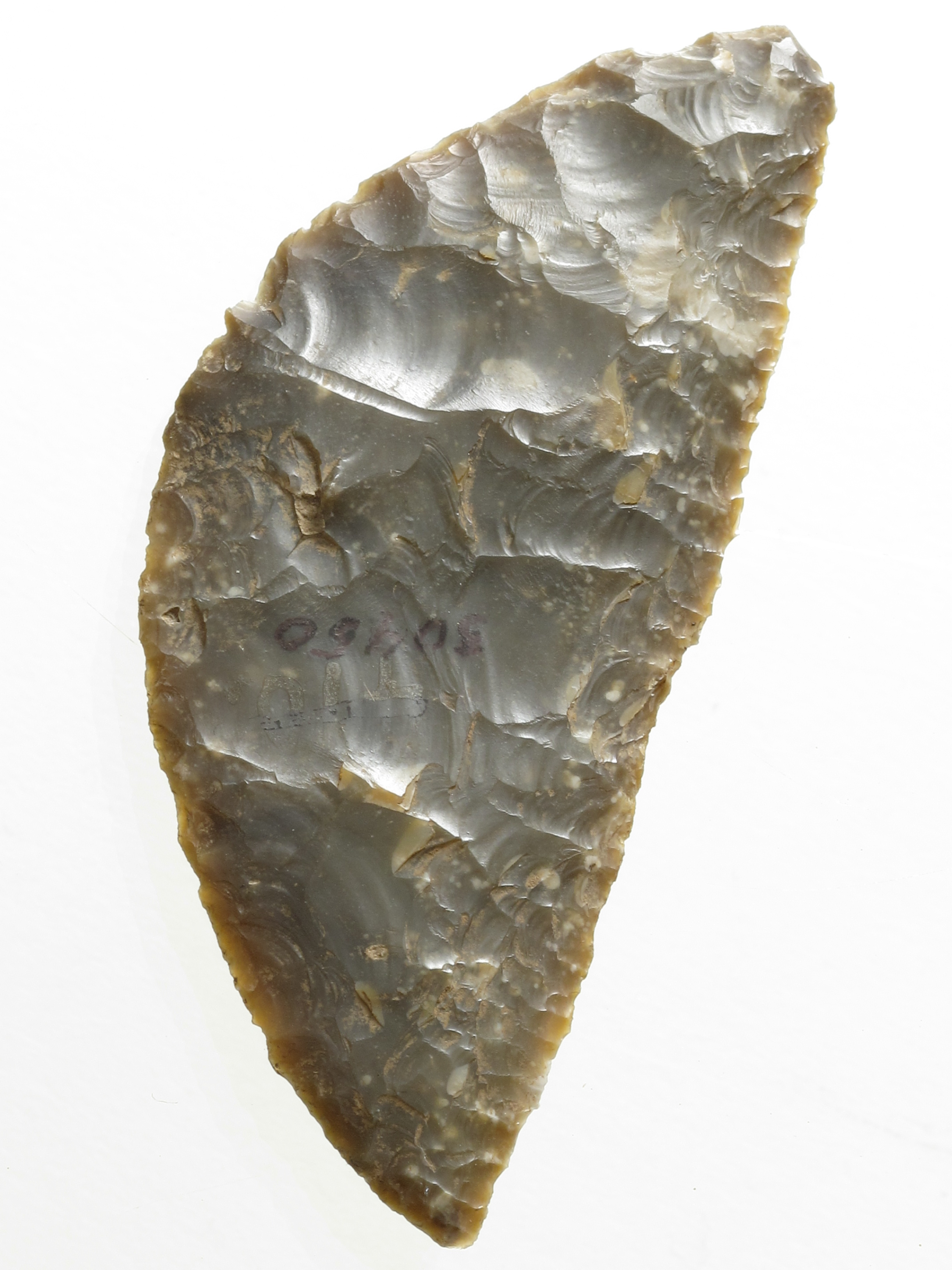 Kornsigd av flint. Steinen festes i et handtak av tre.